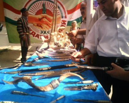 Ножи Истравшана 2011